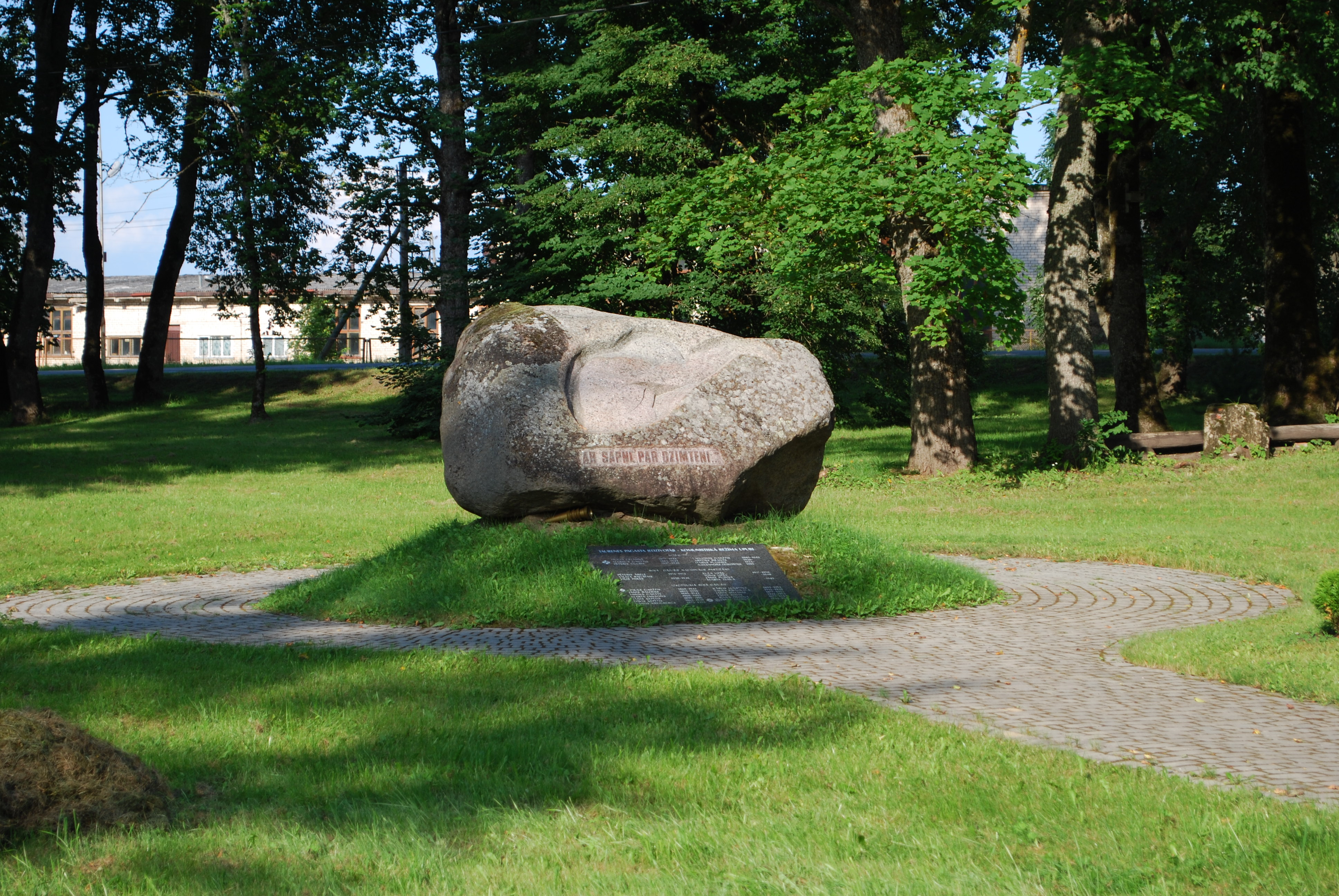 Piemineklis komunistiskā terora upuriem